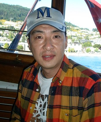 中国演员郝平，摄于新西兰瓦卡蒂普湖上的游轮——恩斯洛蒸汽船。拍摄时间为北京时间。